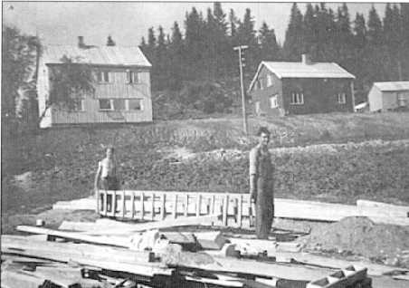 Bygging av yrkesskolen på Kvamsenget 1947